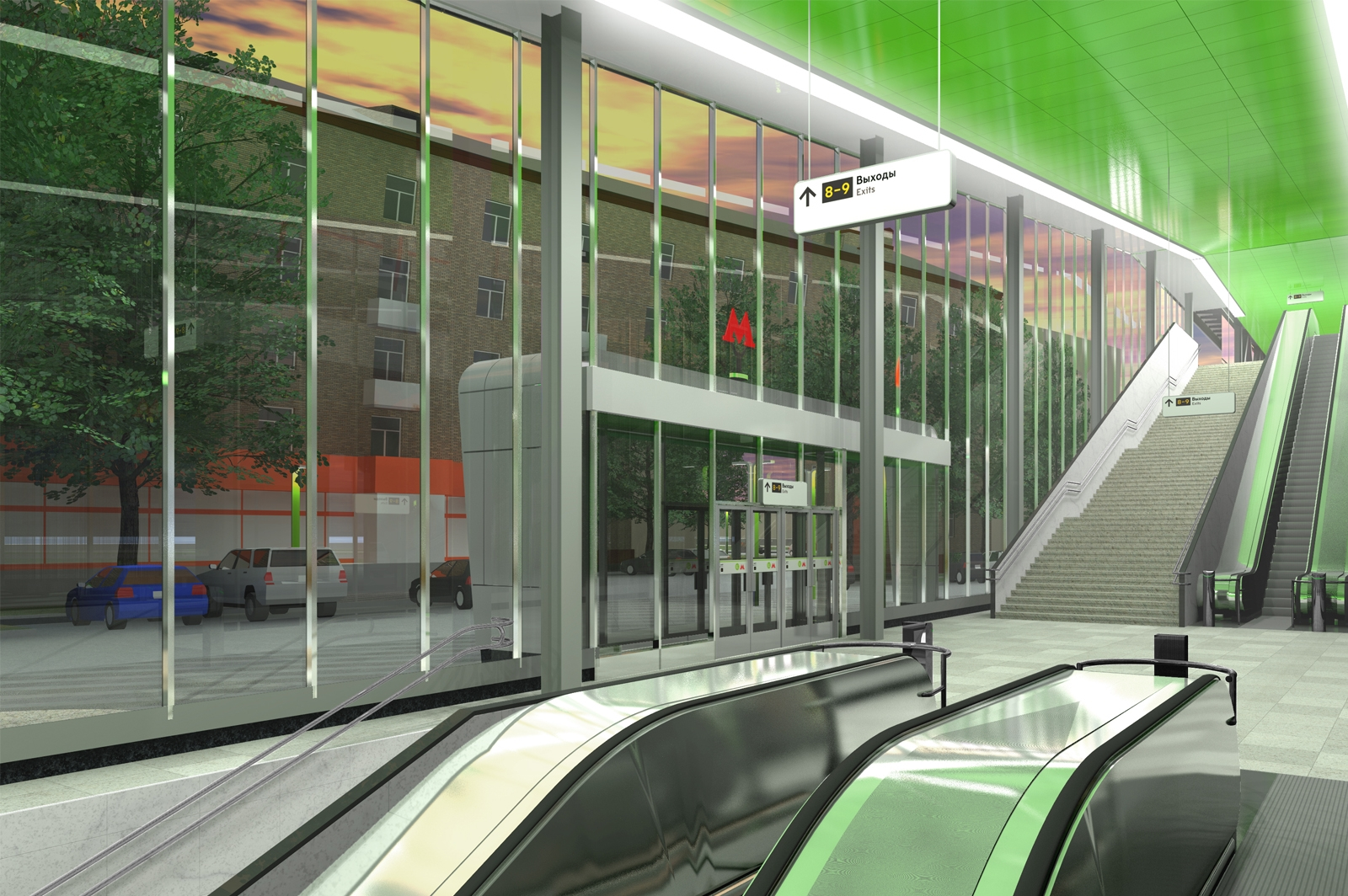 Проект северного вестибюля станции «Окружная» Московского метрополитена.